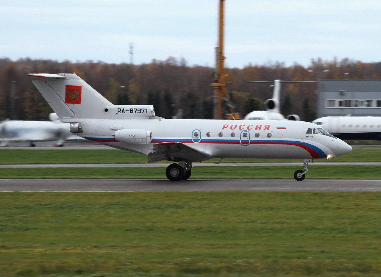 Rossiya Yakovlev Yak-40